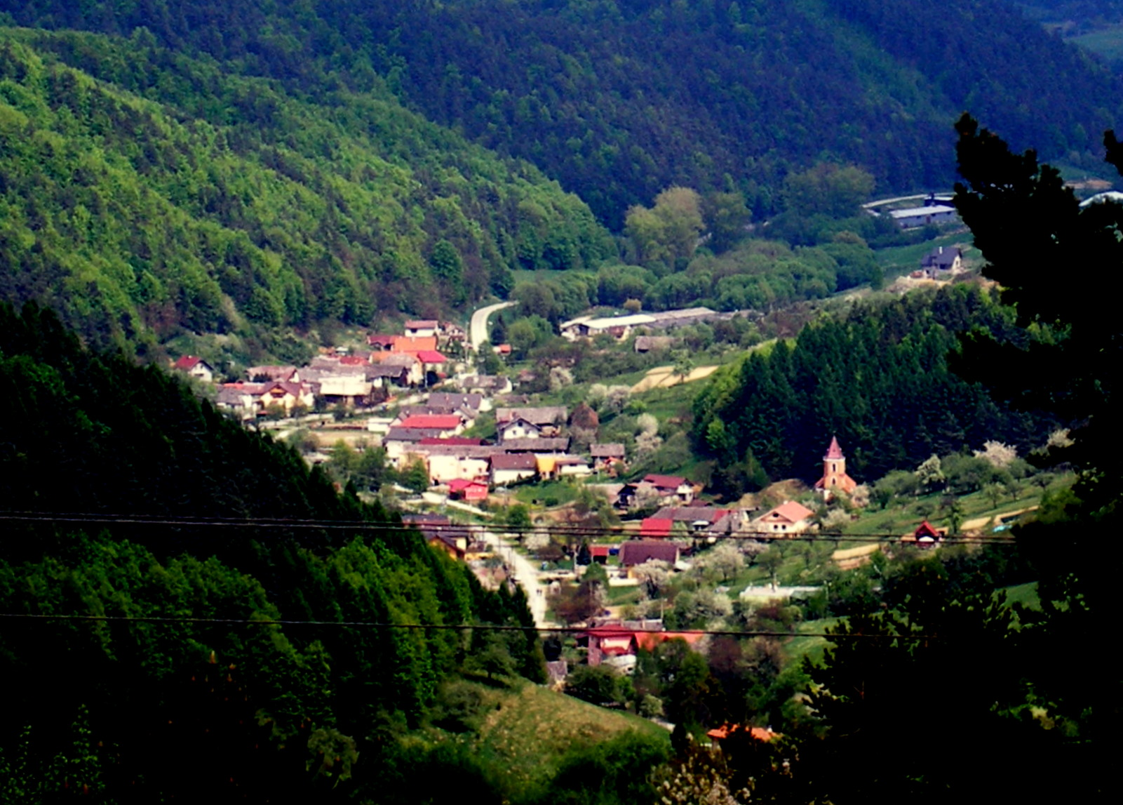 Obec Kvačany okres Prešov.